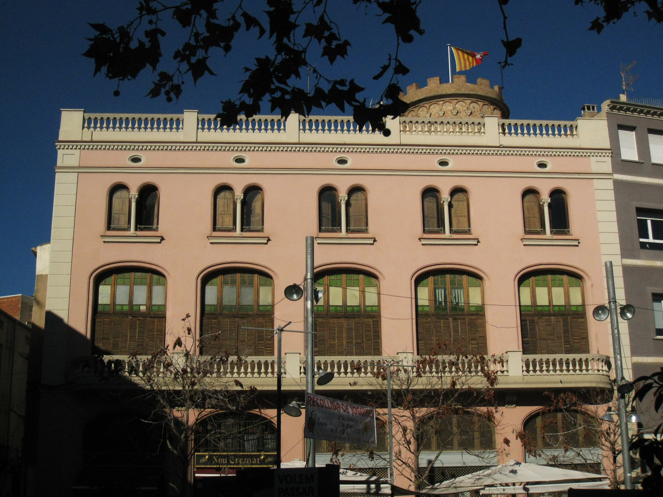 Antic cafè Colon, a la plaça Vella (Terrassa). Edifici de Lluís Muncunill (1926). Al fons s'entreveu la Torre del Palau.